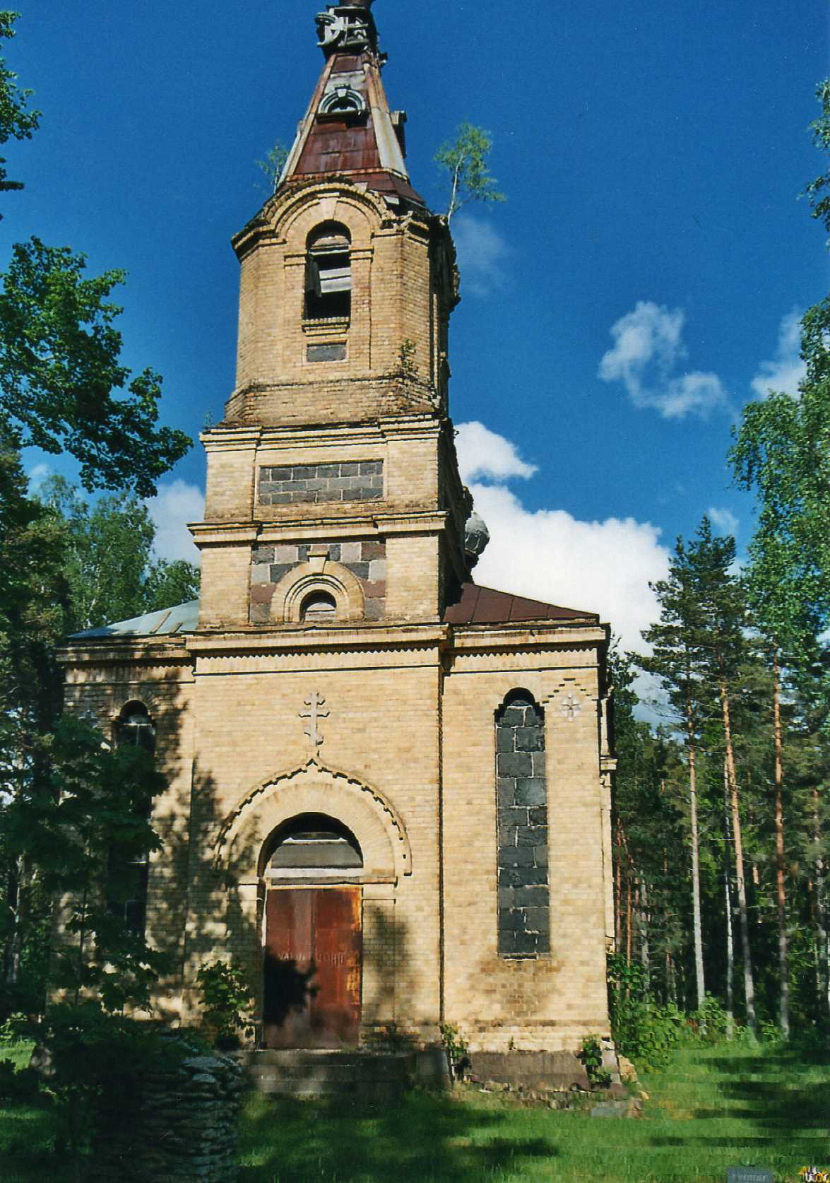 Puski õigeusu kiriku varemed